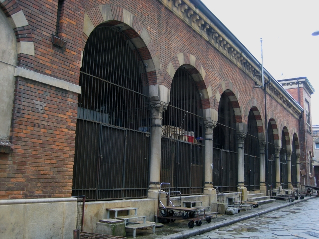 ribarnica u Rijeci